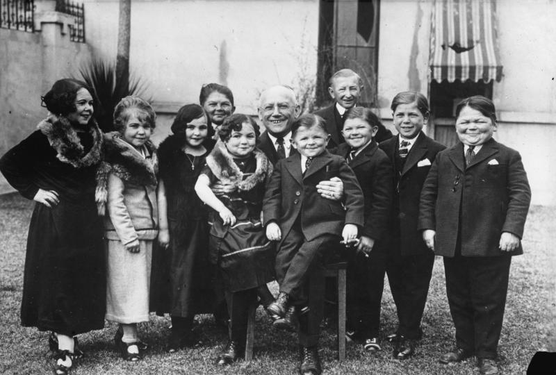 Eine Lilliputanrtruppe im Tonfilm! Der amerikanische Filmkönig Laemmle hat eine Lilliputanertruppe engagiert, welche er im Tonfilm auftreten lassen will. Unser Bild zeigt die Lilliputanertruppe mit dem amerikanischen Filmkönig Laemmle in der Mitte. Information added by Wikimedia users.Carl Laemmle, The Doll Family (left)